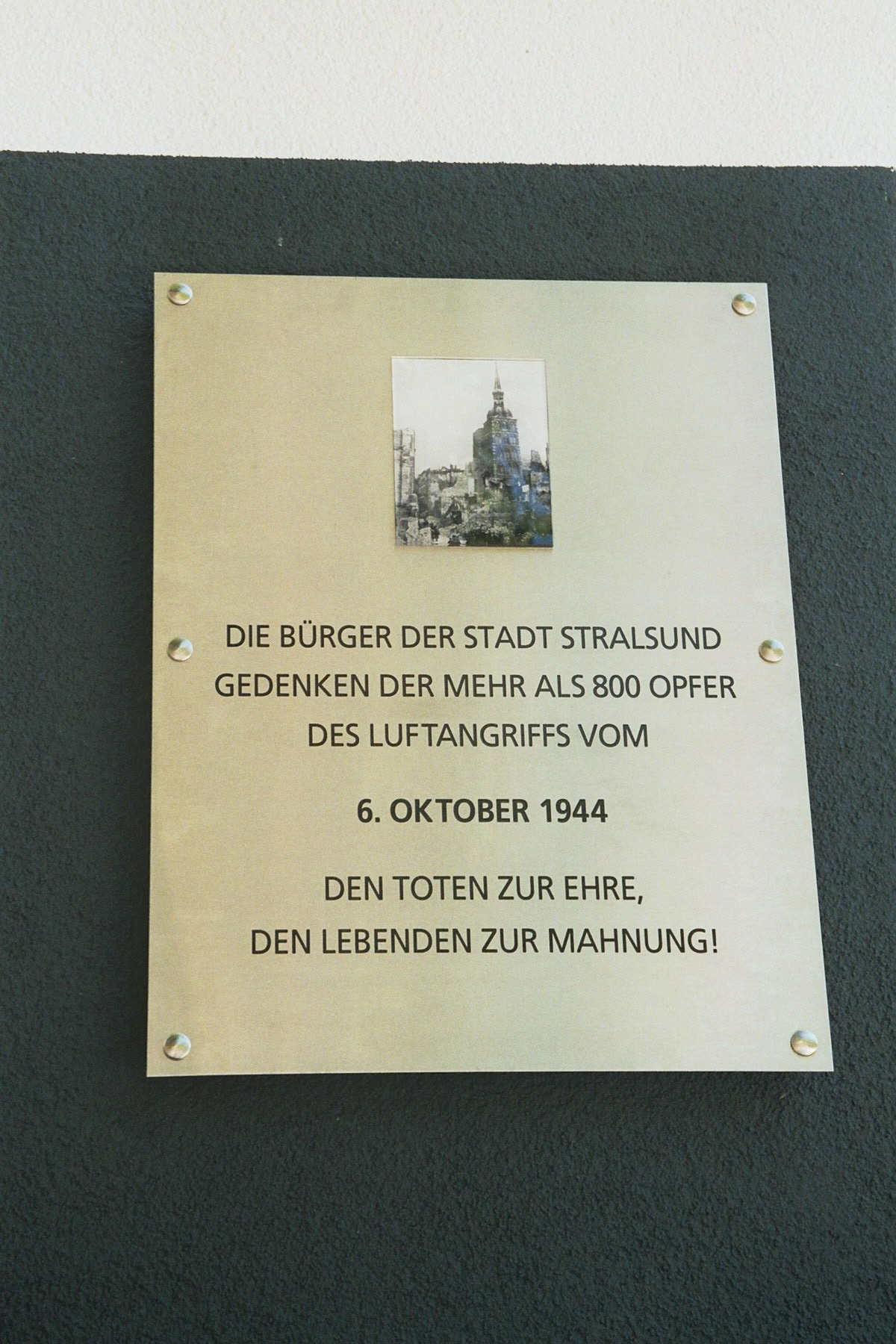 Stralsund, Gedenktafel Luftangriff (2005-08-xx), Autor: Benutzer:Klugschnacker